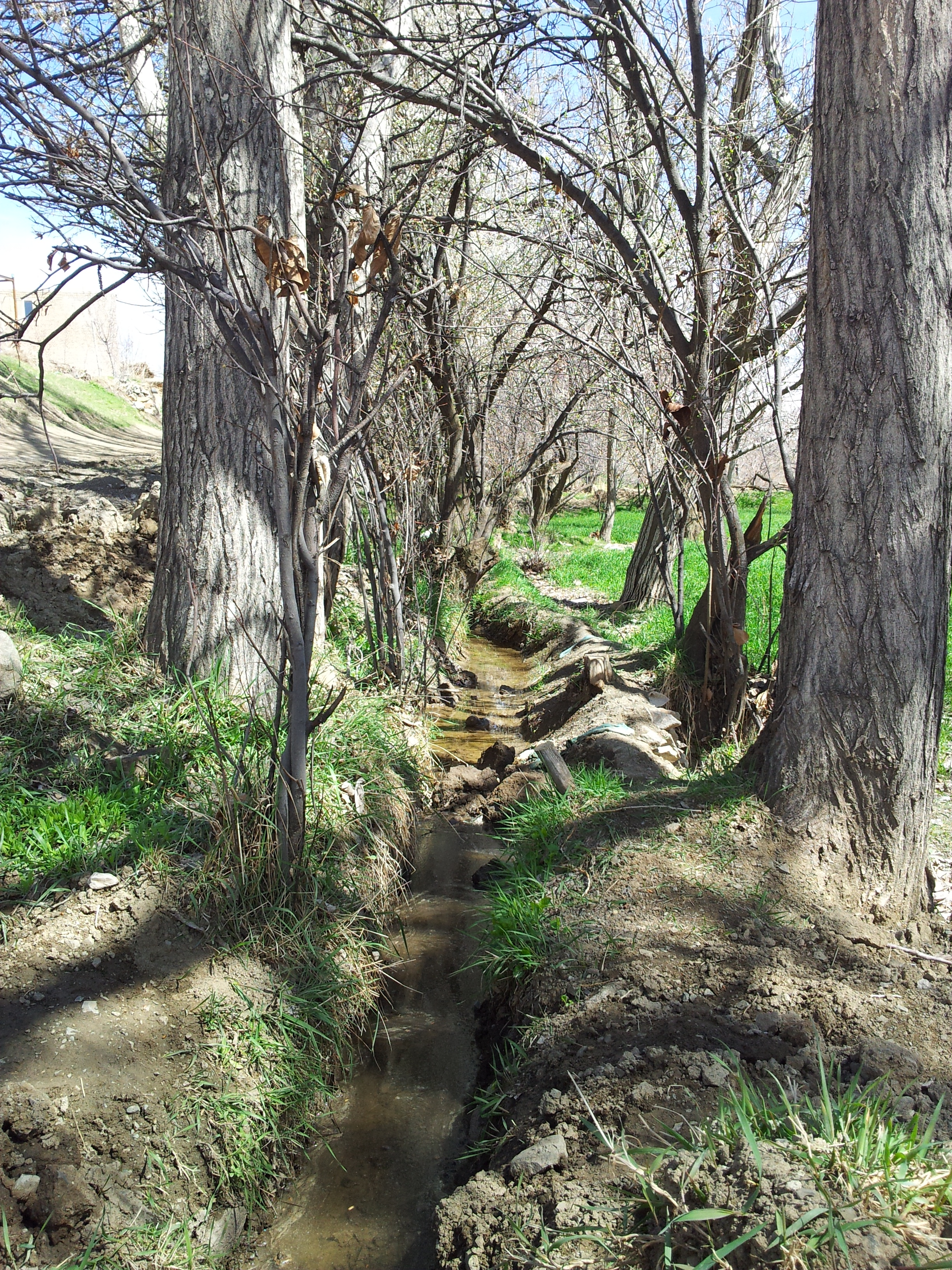 شهرستان زرقان